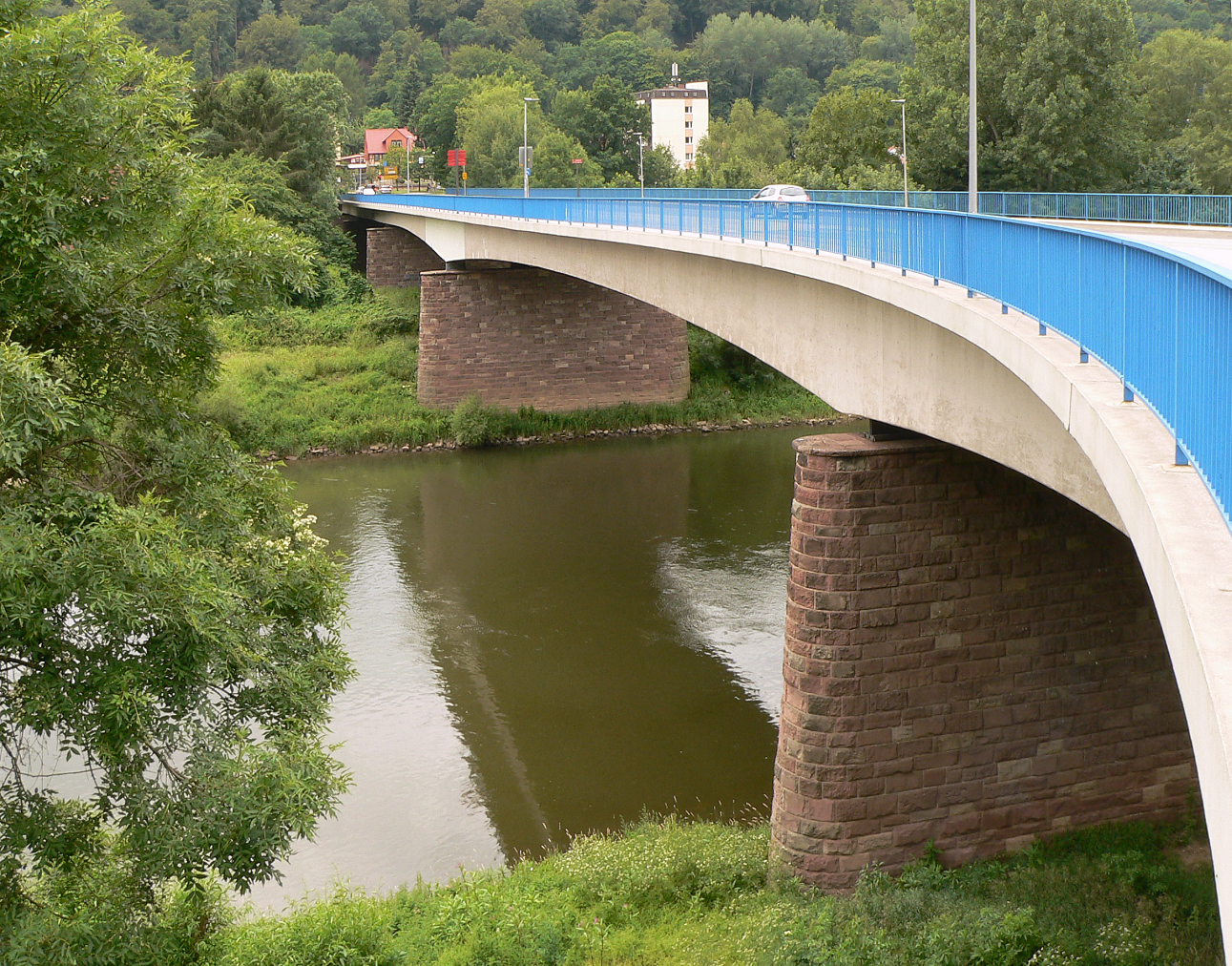 Weserbrücke in Hann. Münden, Blick von Gimter Seite